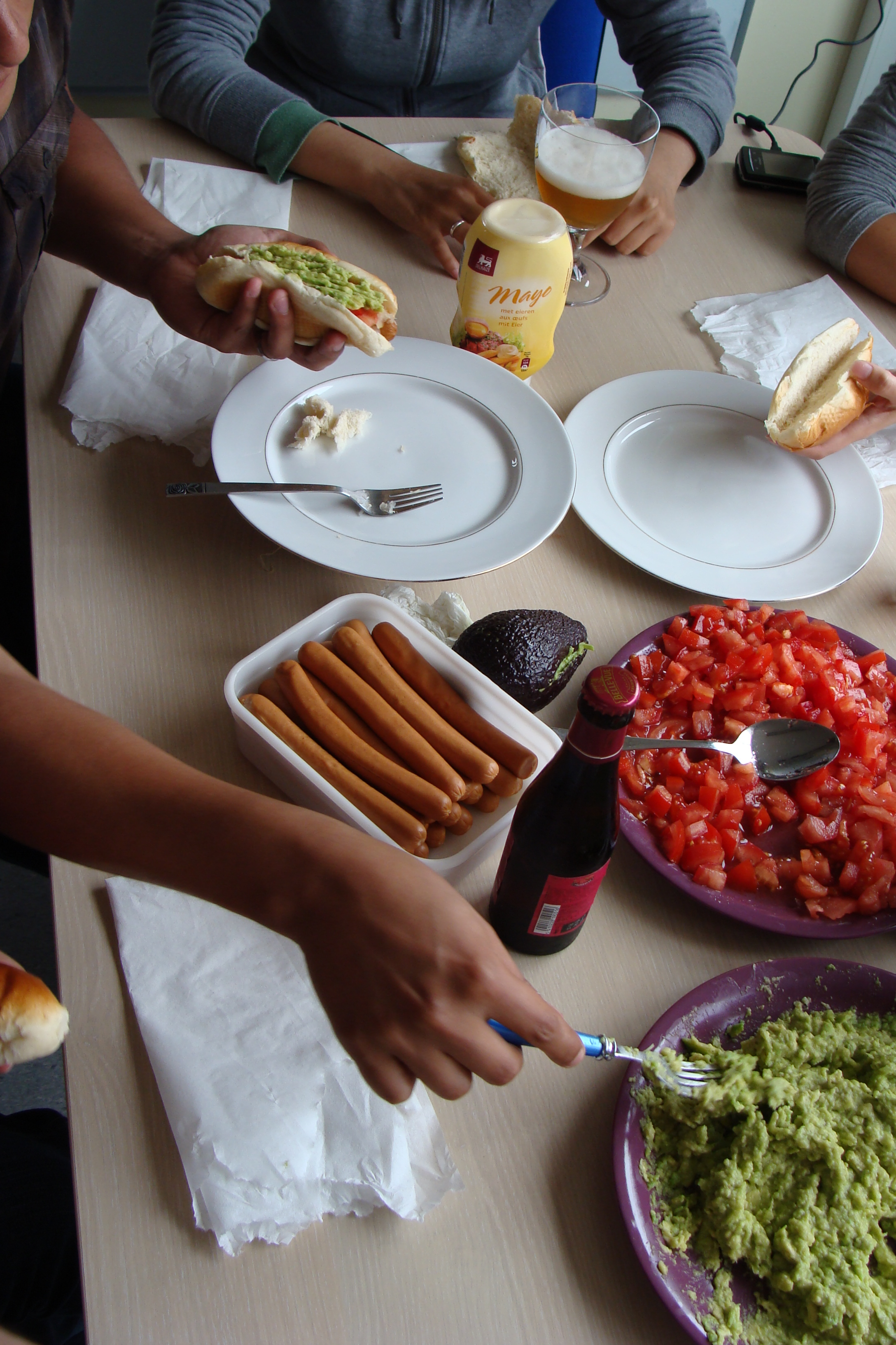 Fotografía muestra unas personas realizando una completada de almuerzo.